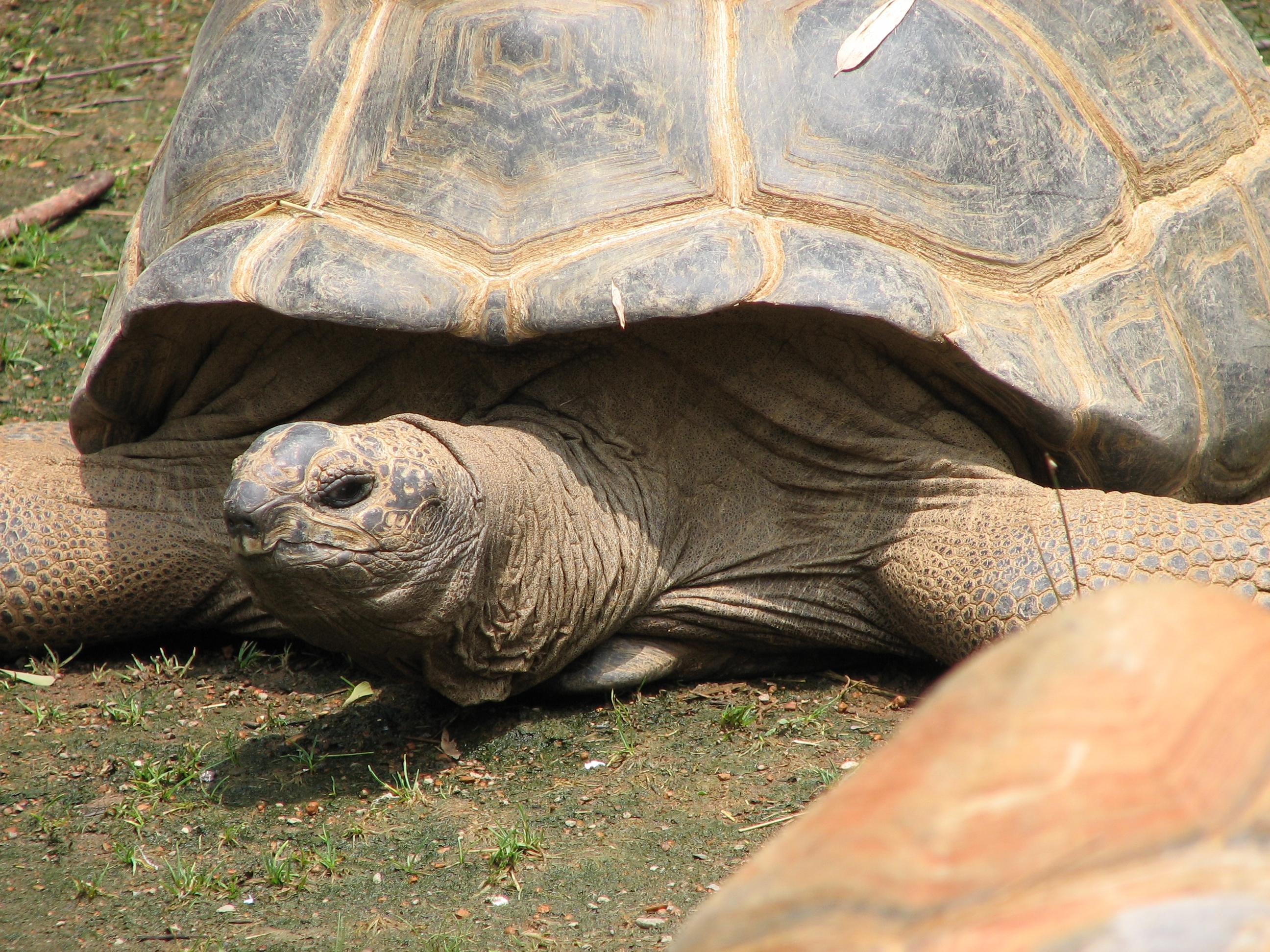 Aldabra Tortoise